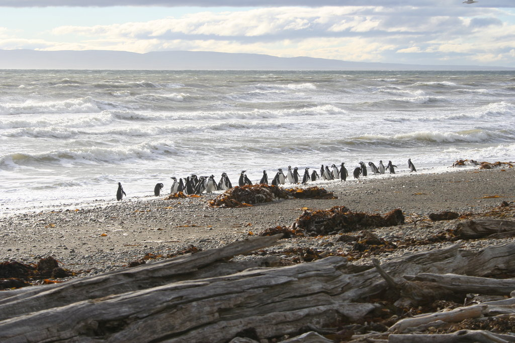 Magellanic penguins (Punta Arenas, Patagonia, Chile)